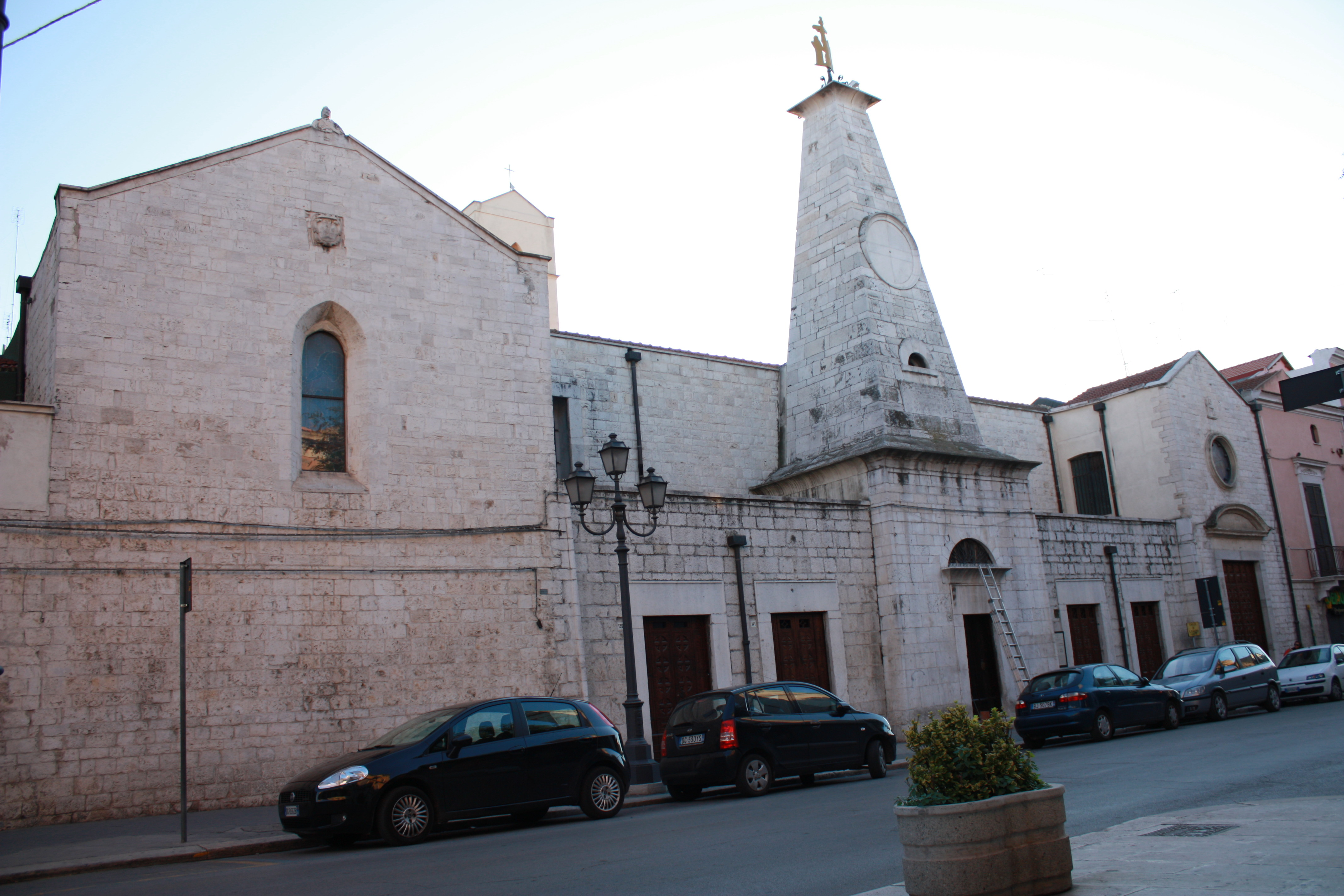 Prospetto su Corso Vittorio Emanuele della Chiesa di San Giacomo